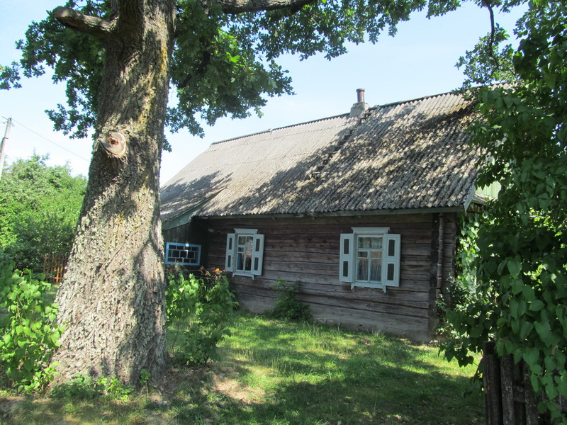 Пількаўшчына. Хата братавай М.Танка